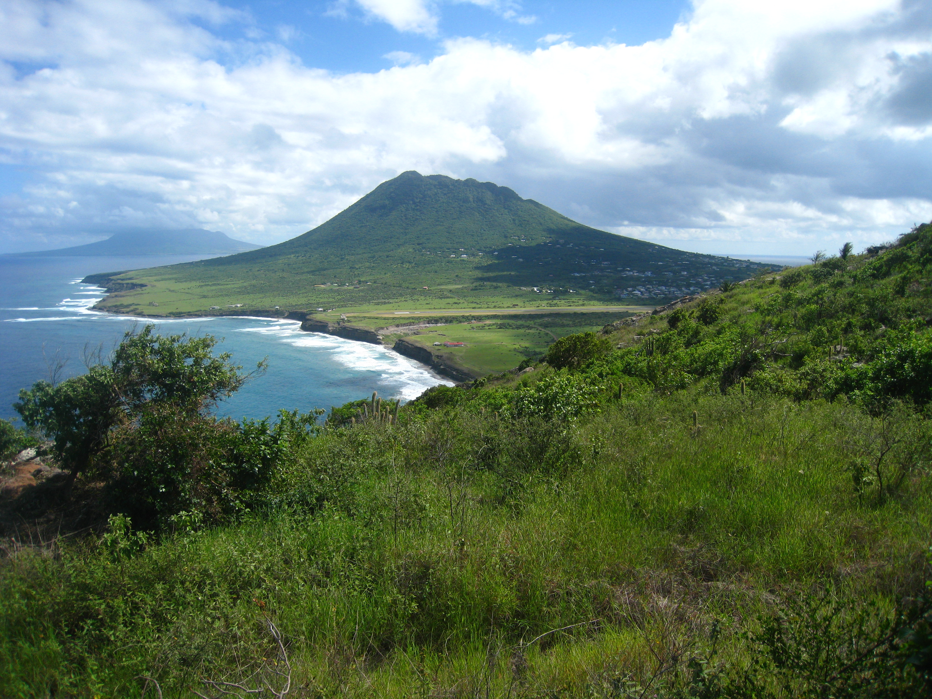 The Quill, St. Eustatius' dormant volcano